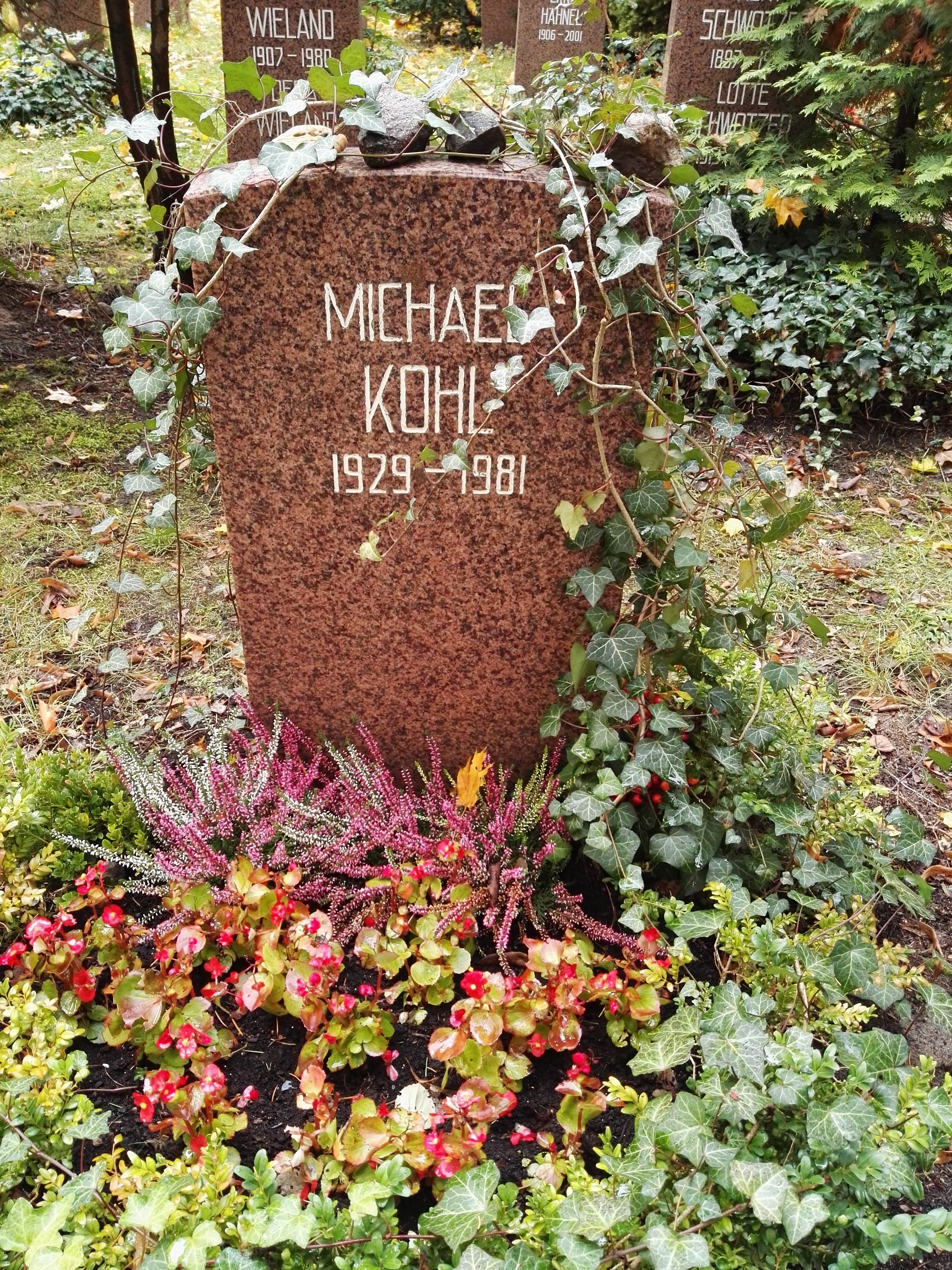 Grab von Michael Kohl auf dem Sozialistenfriedhof des Zentralfriedhofs Friedrichsfelde